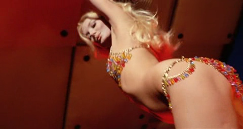 Screenshot dal film Milano calibro 9 (1972) di Fernando Di Leo. Fonte Screenshot catturato e caricato dal DVD della 'Raro Video' da El Tarantiniese. Software utilizzato: Asus DVD